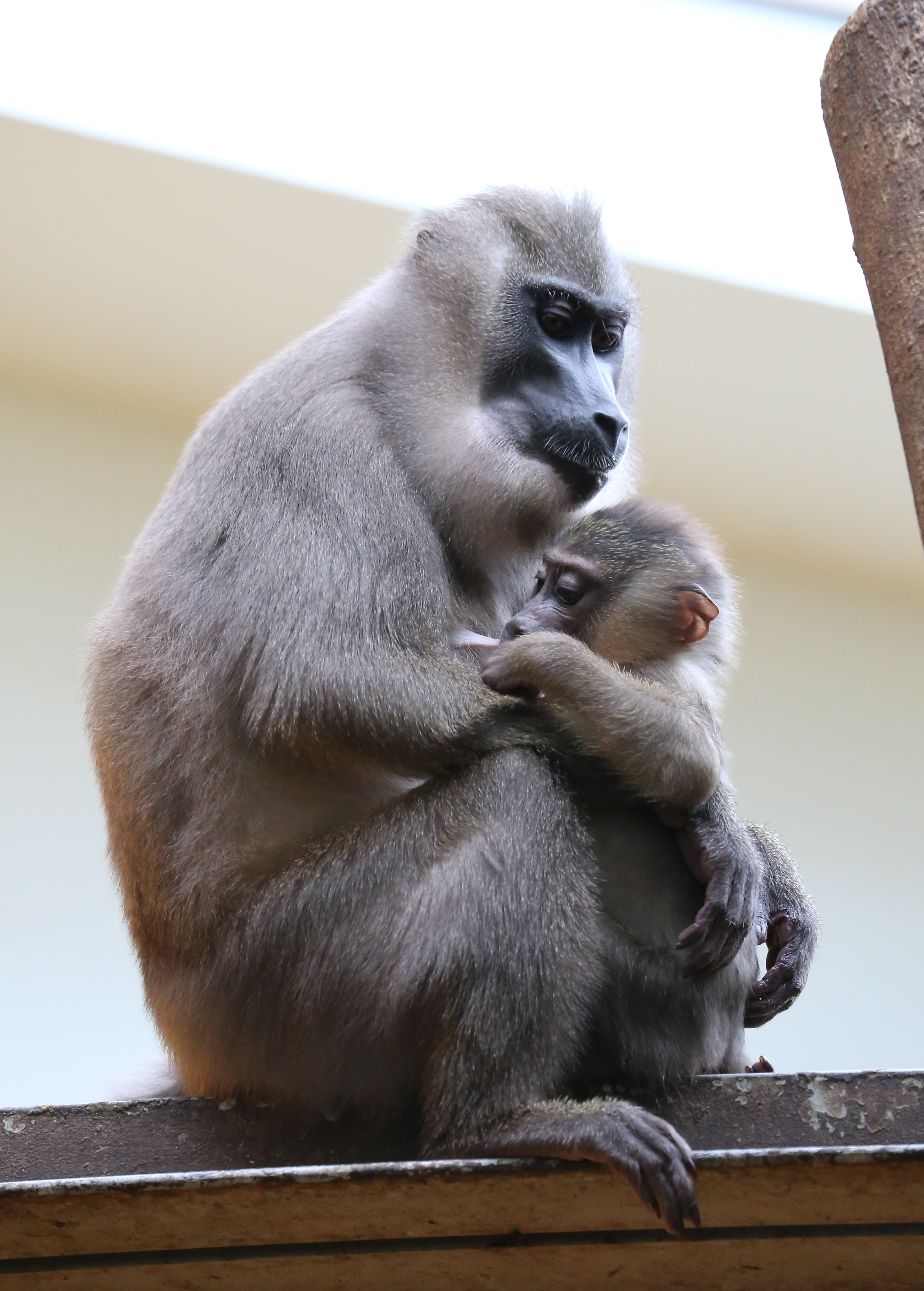 Drill (Mandrillus leucophaeus), Tierpark Hellabrunn, München